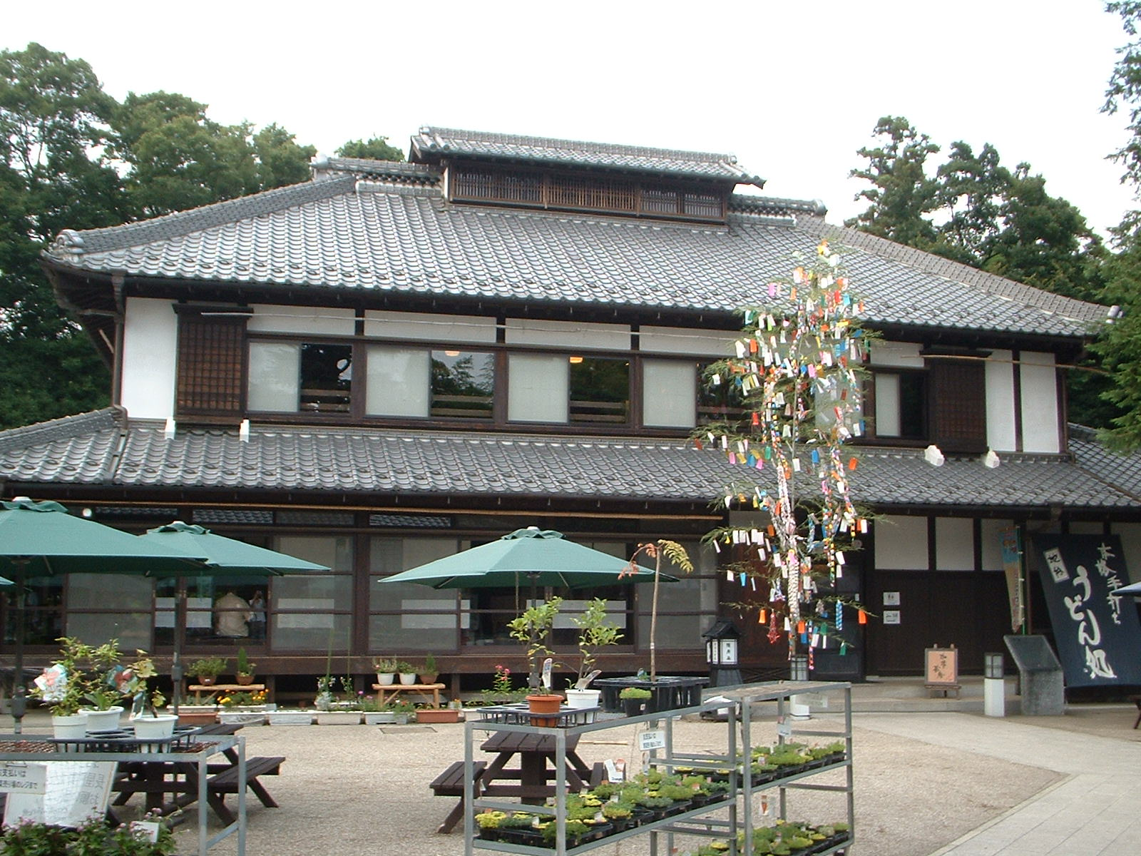 べに花ふるさと館の母屋。ここでうどんが食べられる。